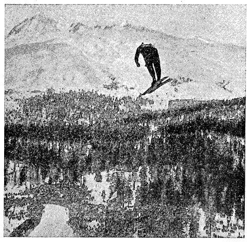 Swiss ski jumper Bruno Trojani